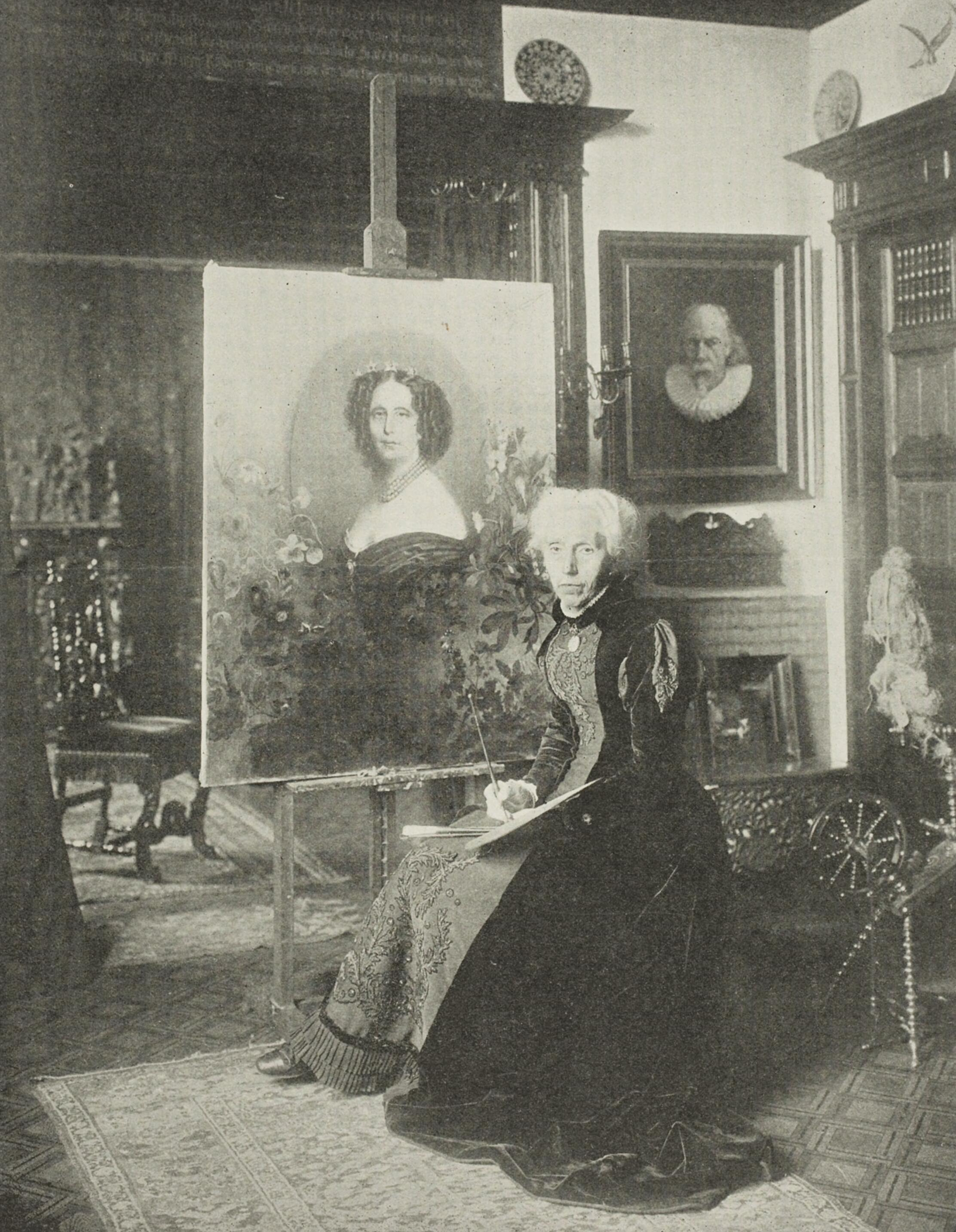 Mevr. Kate Bisschop-Swift in haar atelier